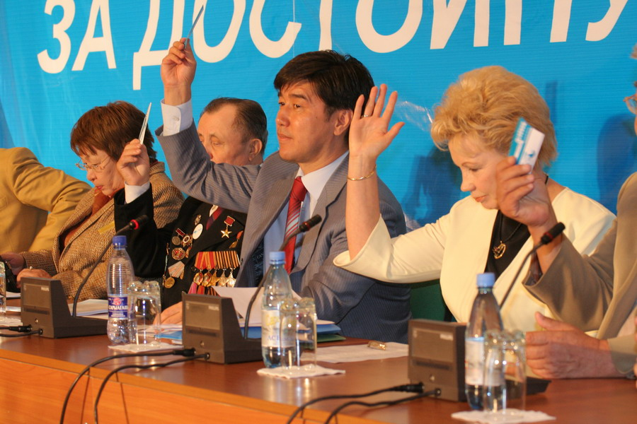 Съезд Демократической партии Казахстана "Ак жол". На фото - Алихан Байменов и Людмила Жуланова